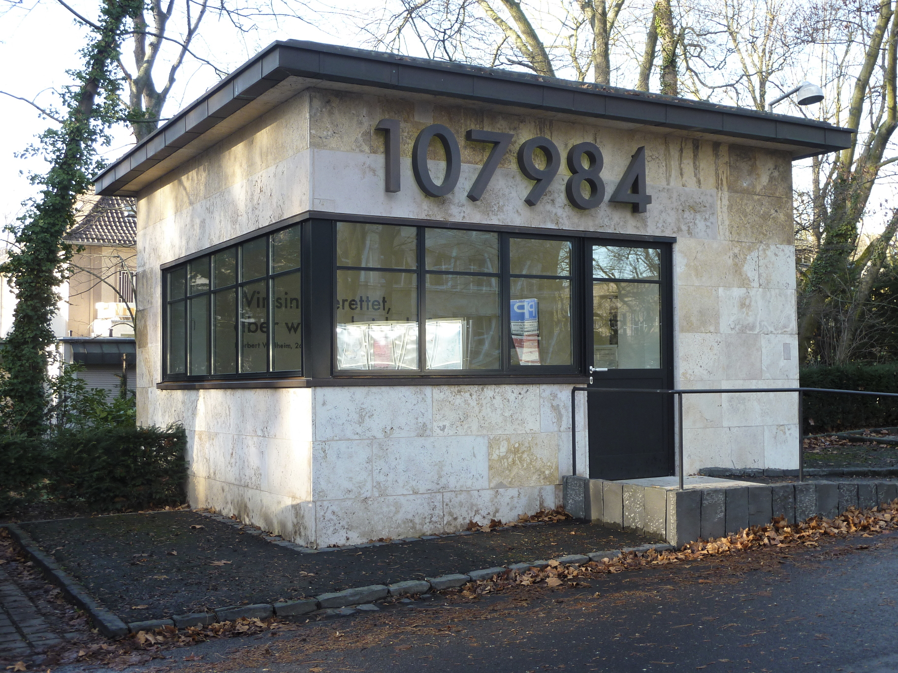 Stadt Frankfurt am Main, Johann-Wolfgang-von-Goethe-Universität: Ansicht des Uni-Campus Westend im Stadtteil Westend-Nord. Das Foto zeigt den Pavillon der Norbert Wollheim (1913–1998) gewidmeten Holocaust-Gedenkstätte am westlichen Rand des Campus. Wollheim mußte in der Zeit des Nationalsozialismus Zwangsarbeit für die I.G. Farben leisten und verklagte den Konzern im Jahr 1951 auf Entschädigung. Die an der Fassade angebrachten Ziffern sind die Häftlingsnummer Norbert Wollheims im Konzentrationslager Buna/Monowitz. Ansicht der Gedenkstätte von Südosten.